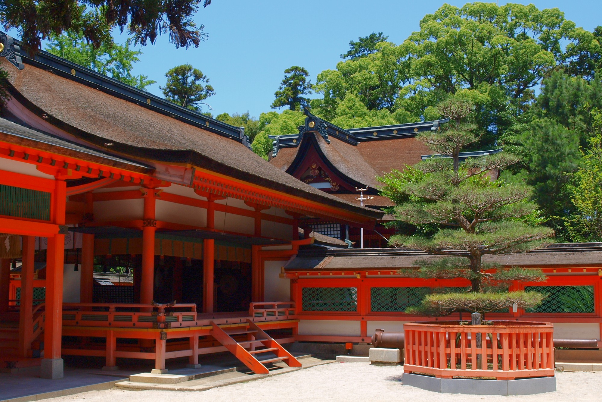 福岡市東区、香椎宮の幣殿と本殿。